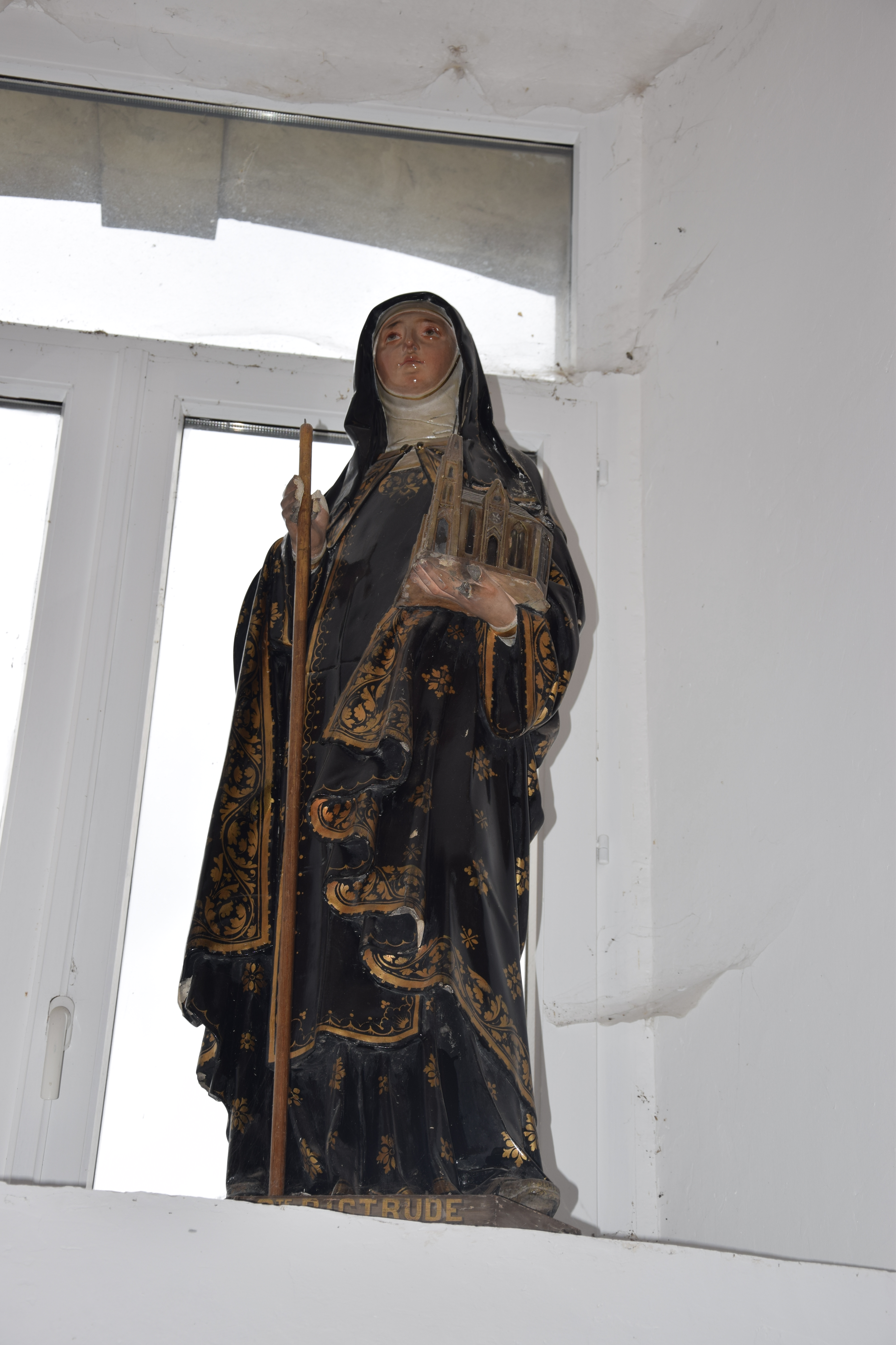 Musée d'histoire locale de Marchiennes